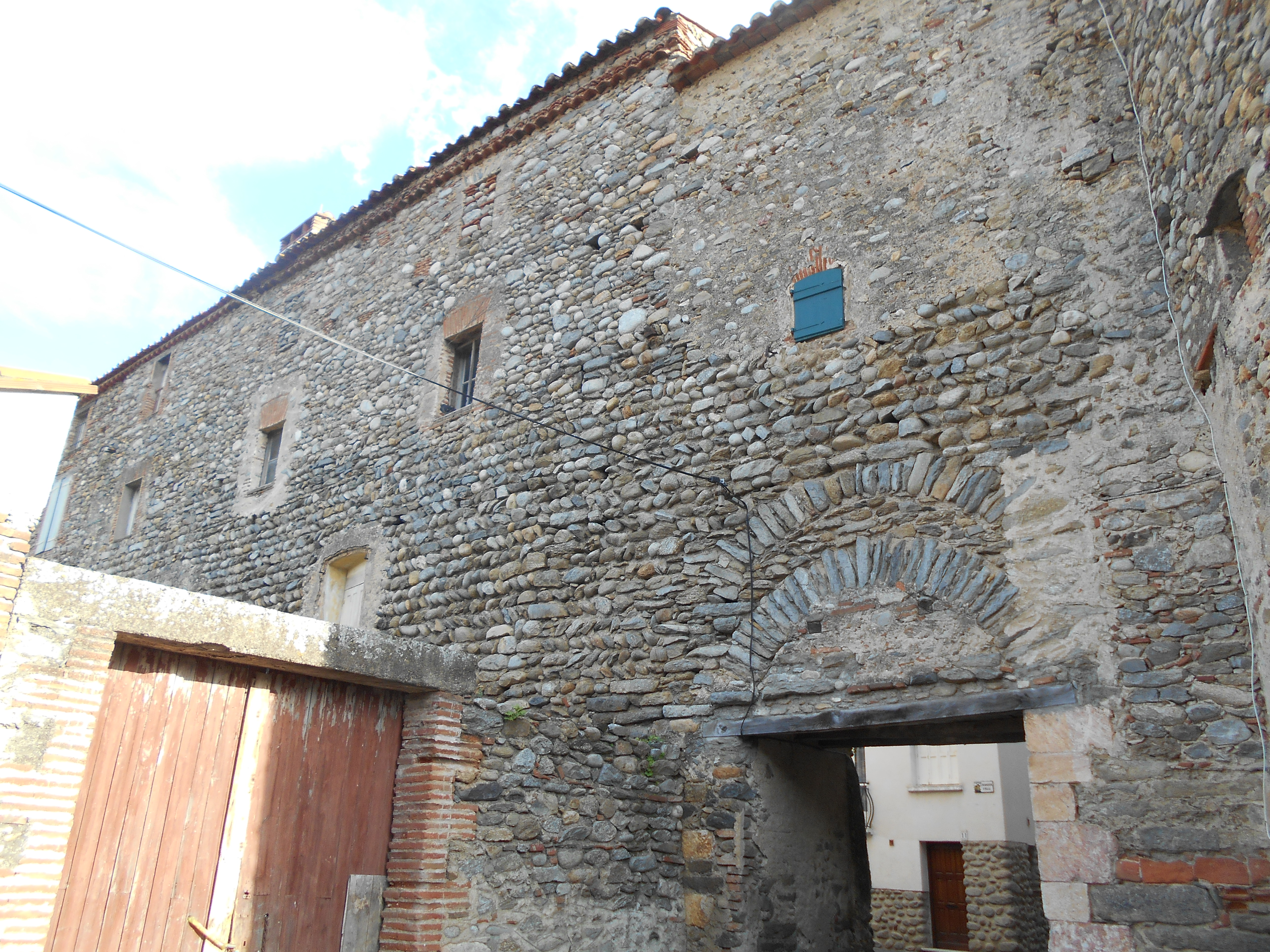 Muralles de Vinçà